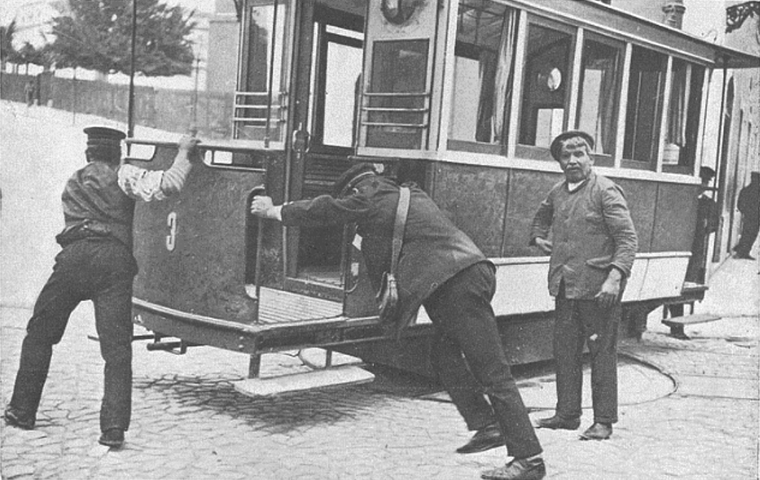 Ascensor da Estrela (carro de cabos, Estrela-Camões), em Lisboa (1890-1913).